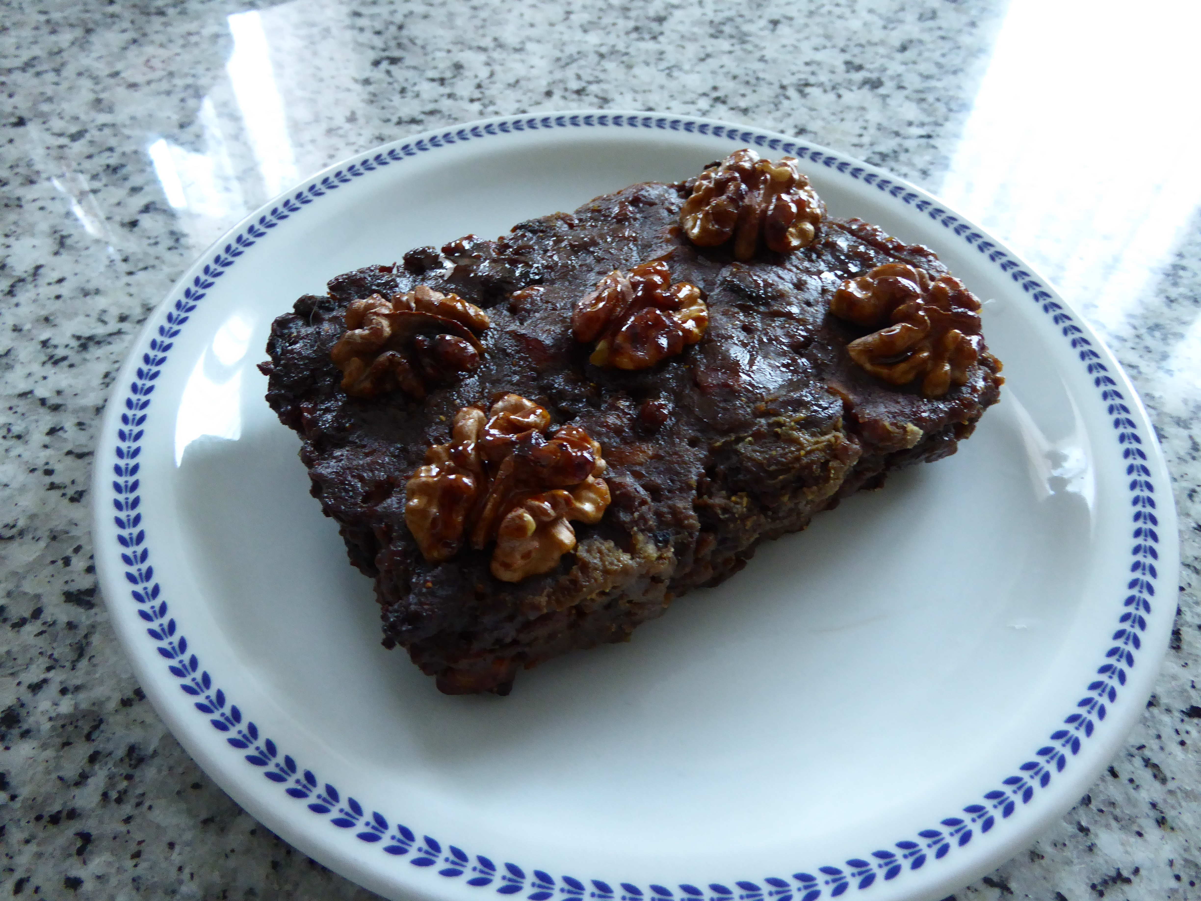 Pitta di san martino nella valle dello Stilaro